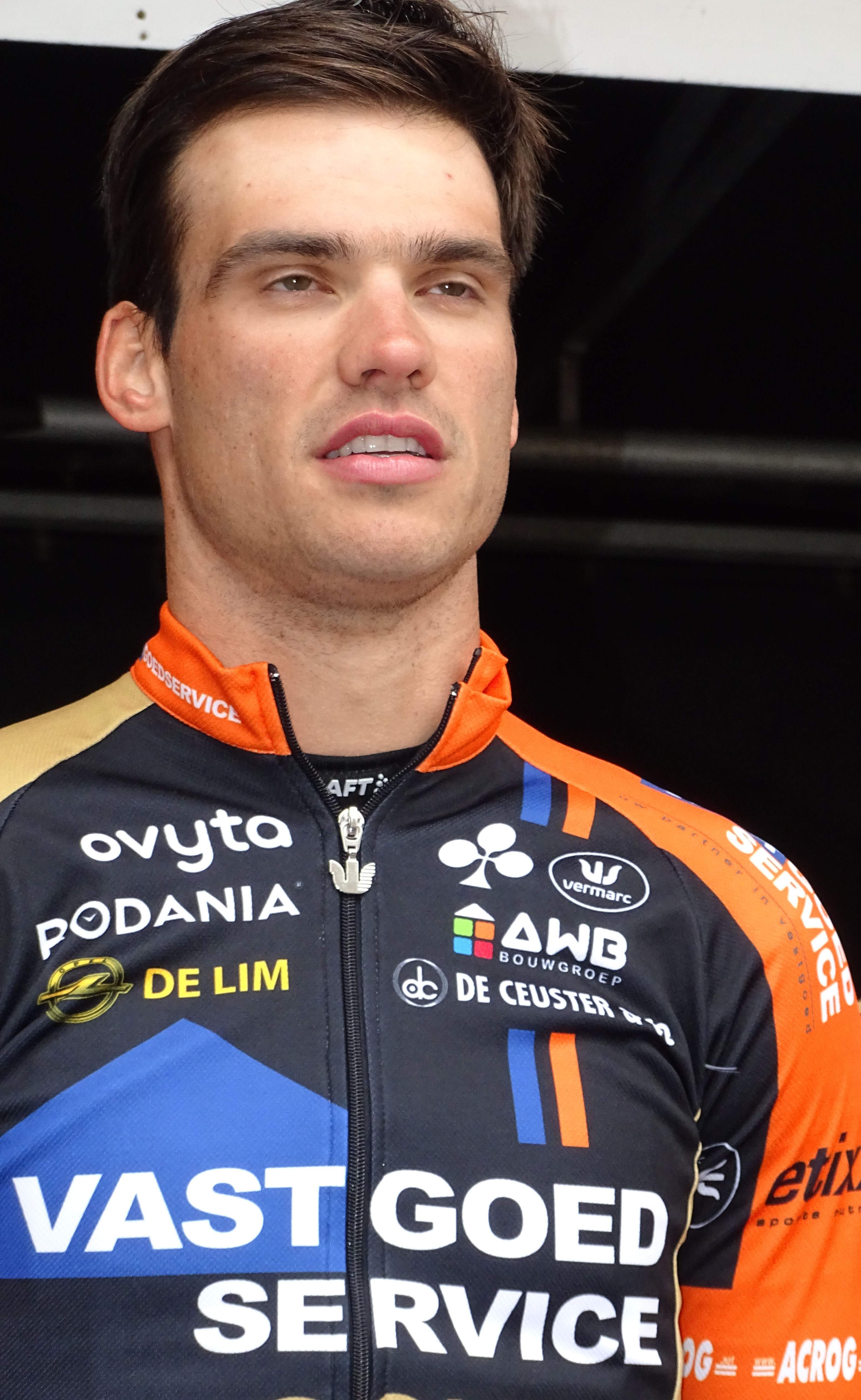 Reportage réalisé le dimanche 15 mars à l'occasion du départ et de l'arrivée de la Course des chats 2015 à Ypres, Belgique.